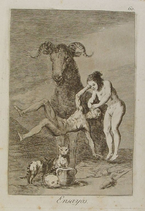 Capricho nº 60: Ensayos de Goya, serie Los Caprichos